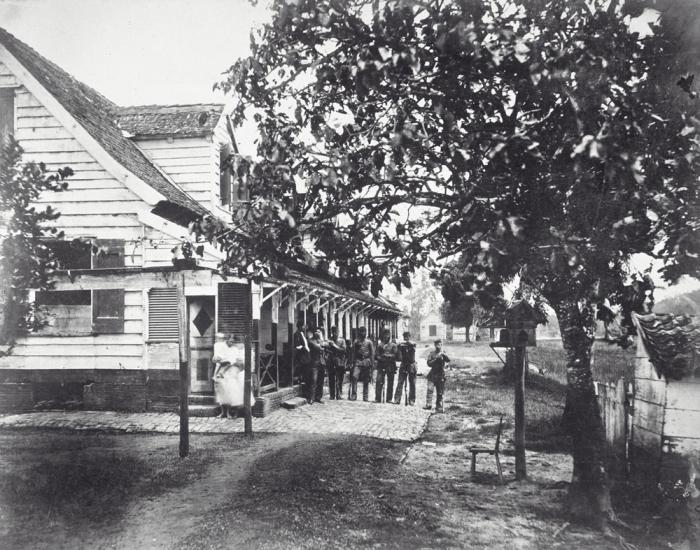 Foto. In de tweede helft van de zeventiende eeuw werd op het punt waar de Commewijne en de Cotticarivier samenkomen een fort gebouwd. Met het gereedkomen van fort Nieuw-Amsterdam werd Fort Sommelsdijck opgeheven. Wel bleef het daarna een militaire post met een veldhospitaal, dat toen vooral dienst deed in de strijd tegen de Marrons.. Militairen in Fort Sommelsdijck